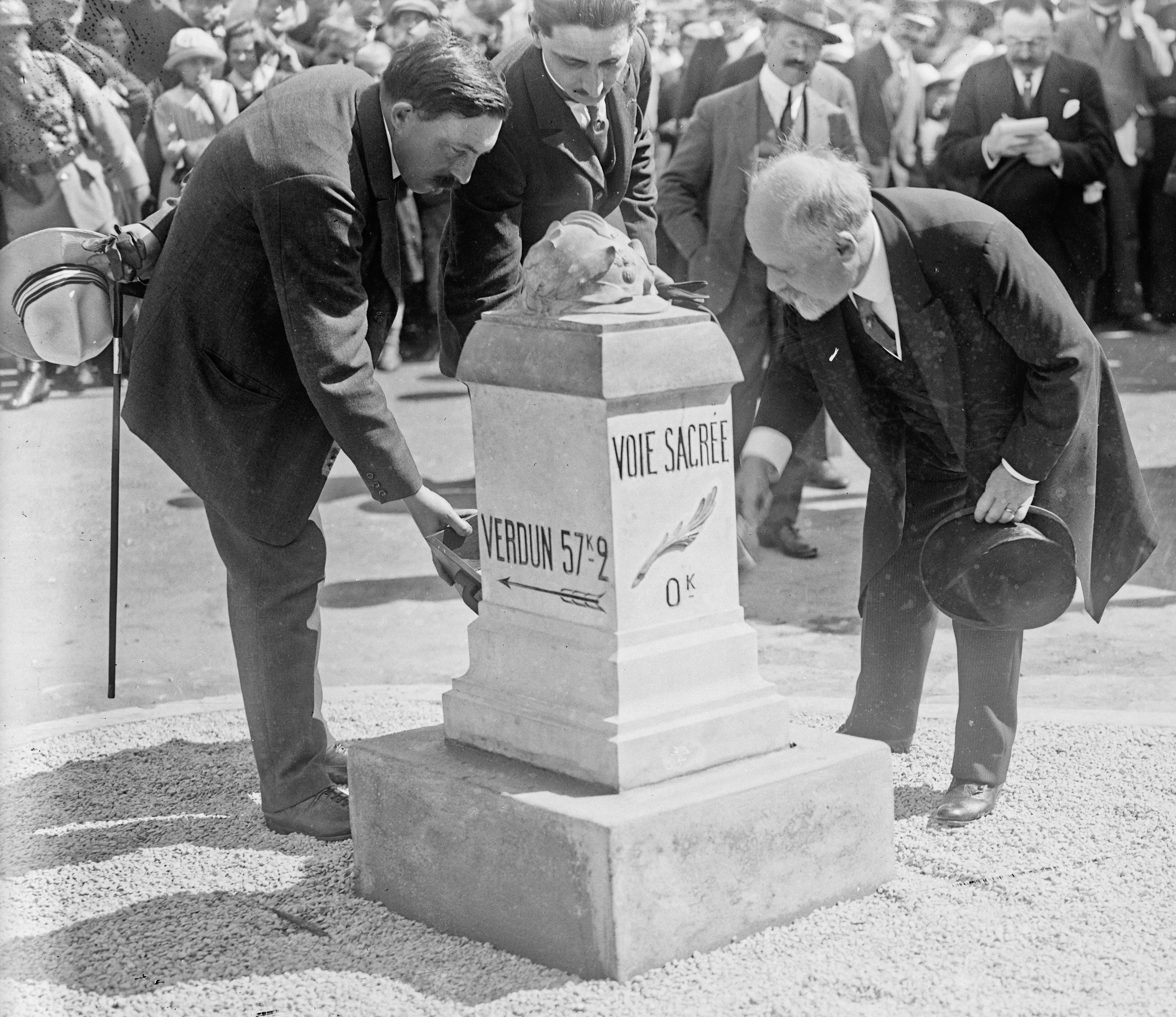 Inauguration de la Voie sacrée, 1ère borne scellée par M. Poincaré. 21-08-1922, Bar-le-Duc.